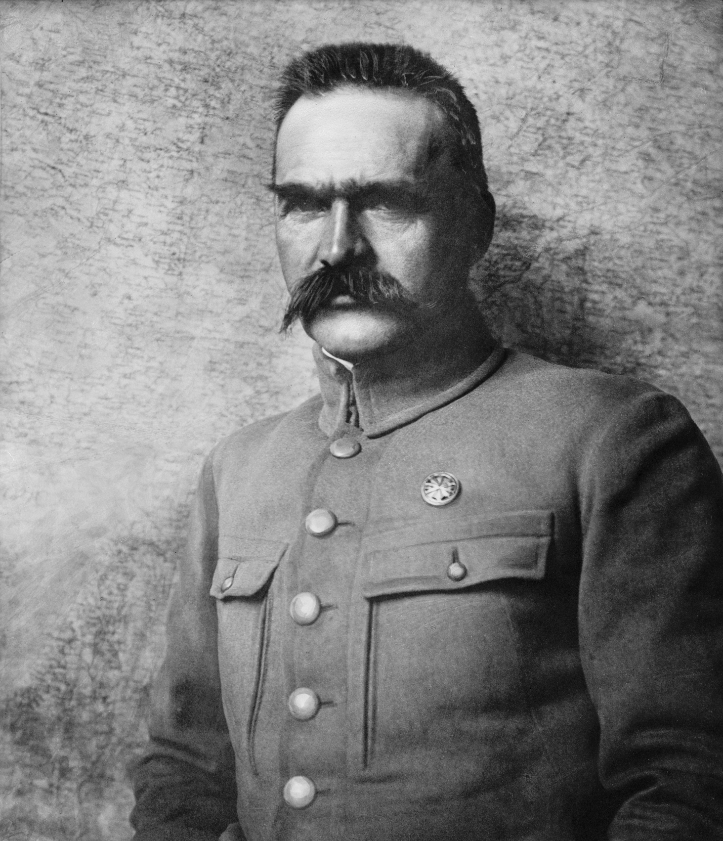 Józef Piłsudski between 1910 and 1920.